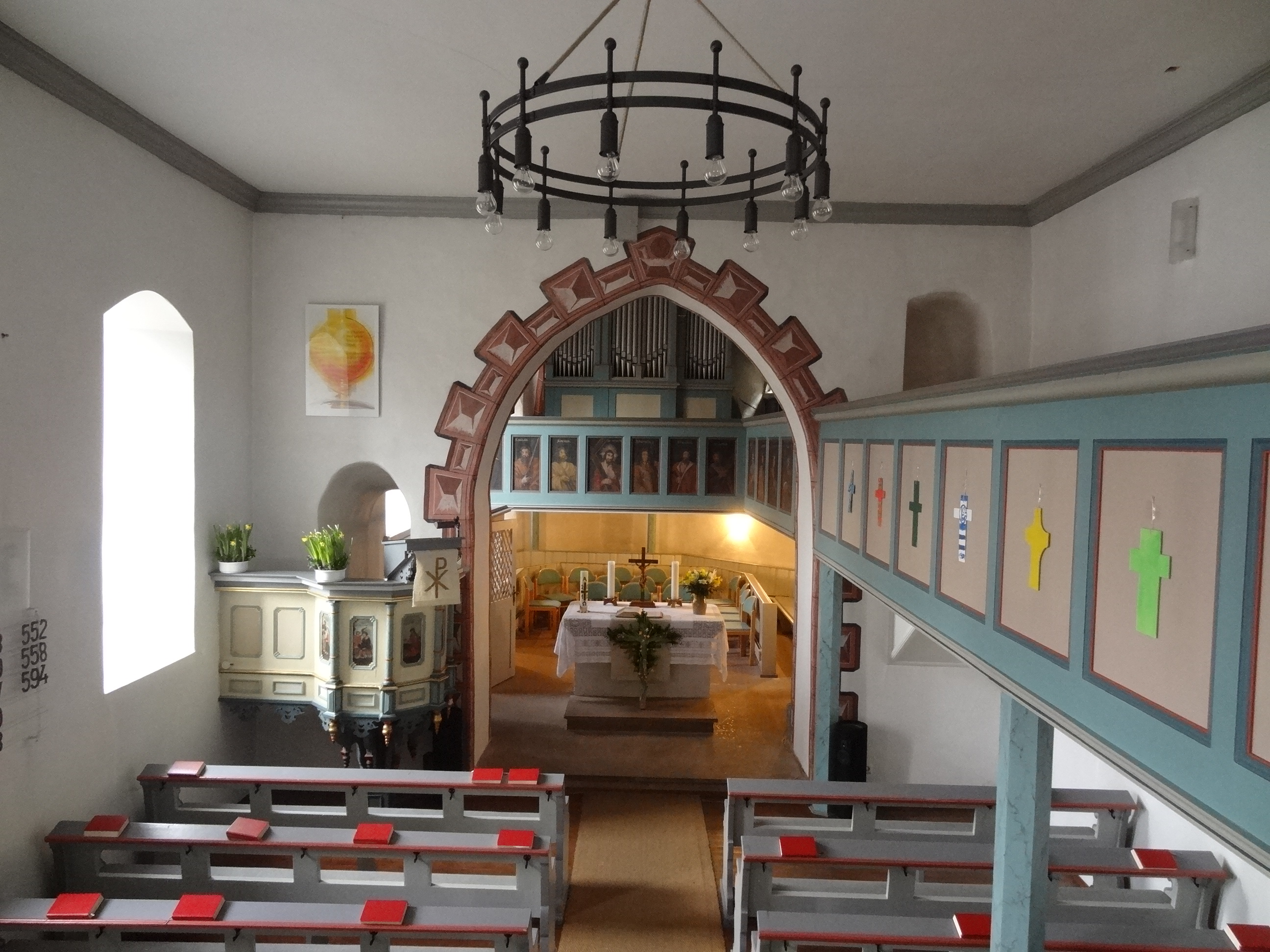 Evangelische Kirche Cleeberg